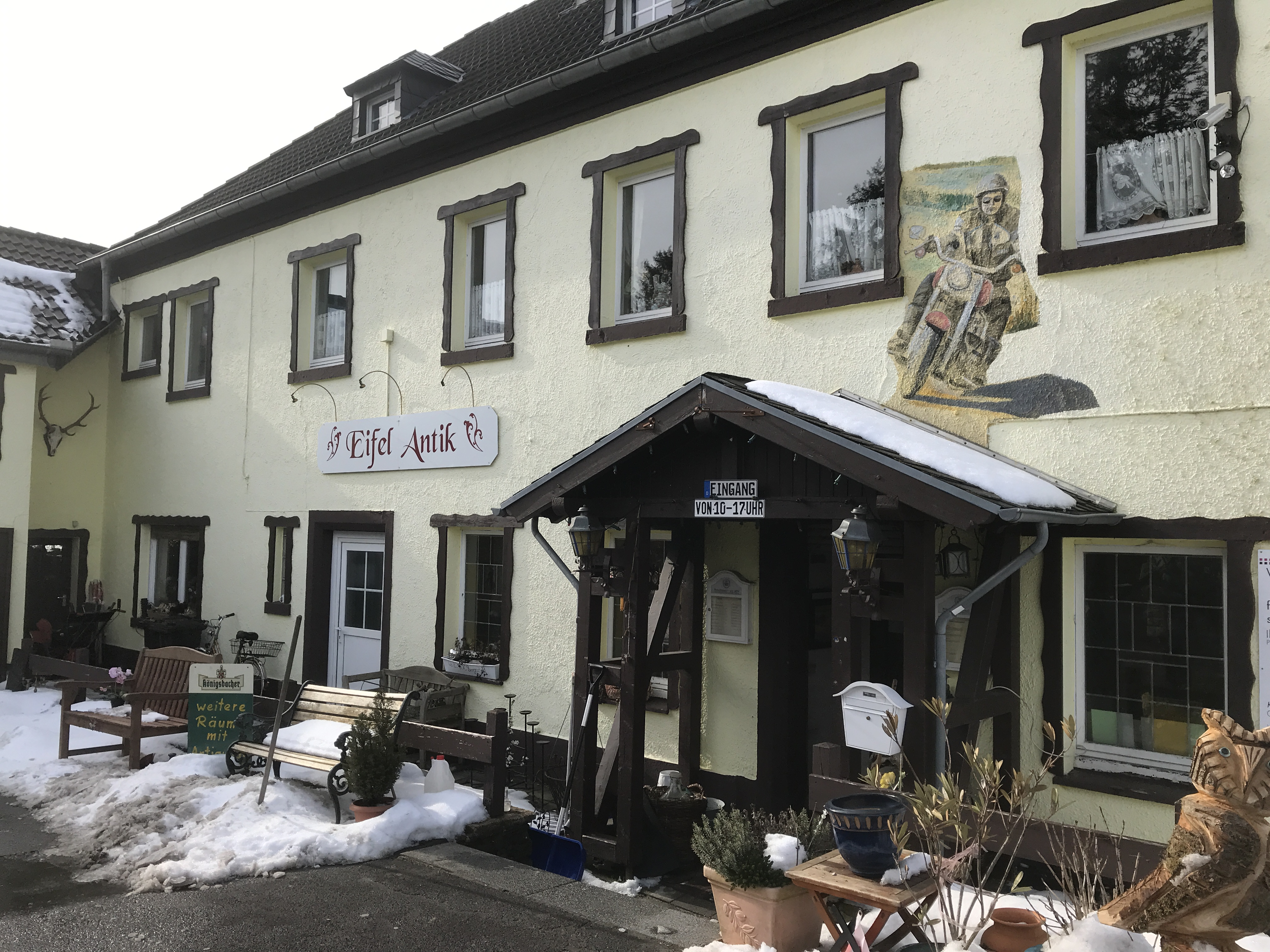 Antik-Markt von Walter Lehnertz in Krekel, ein Ortsteil der Gemeinde Kall in der Eifel im Landkreis Euskirchen